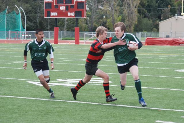 Alameda Rugby